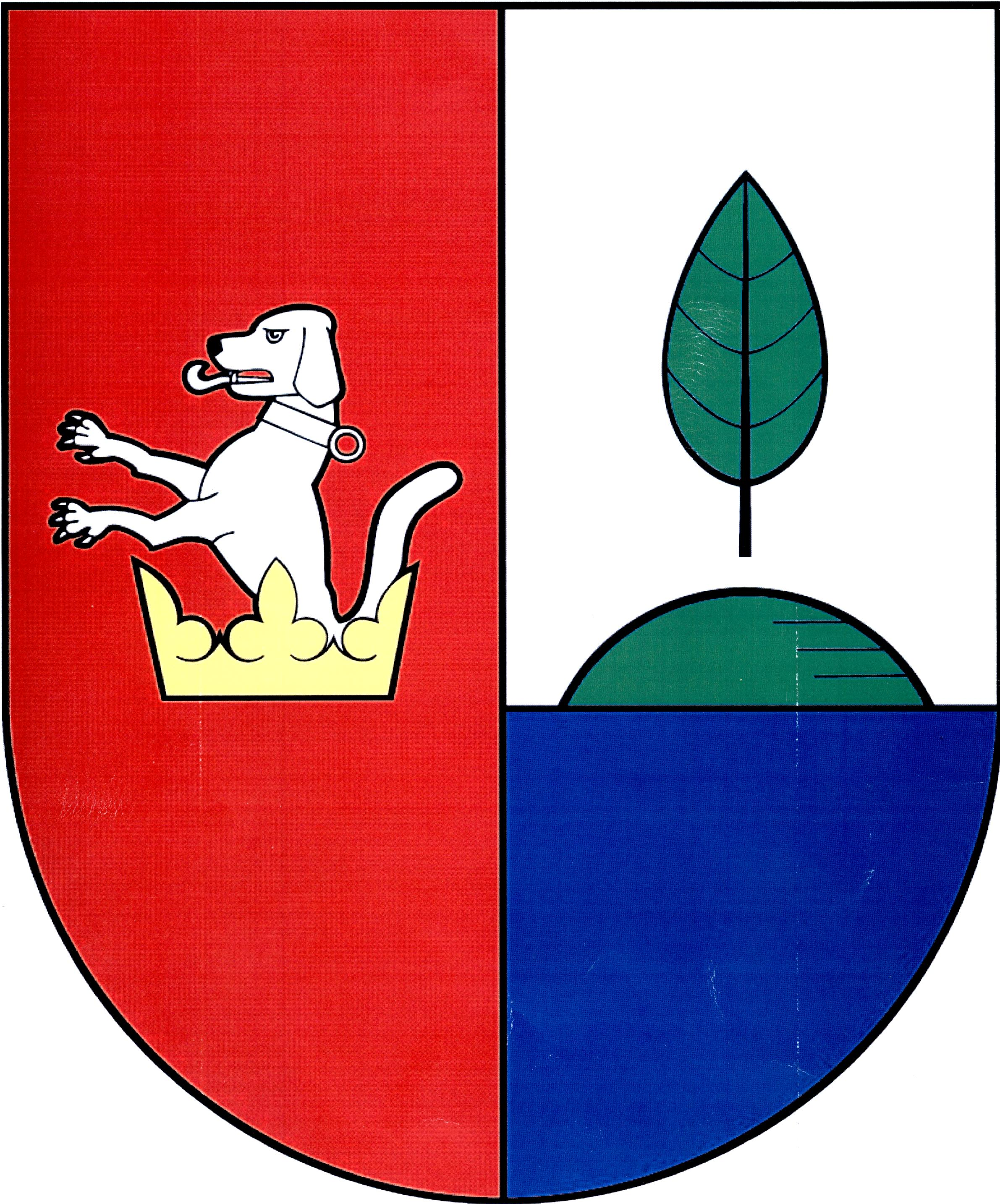 Znak obce Ostrov (okres Chrudim)